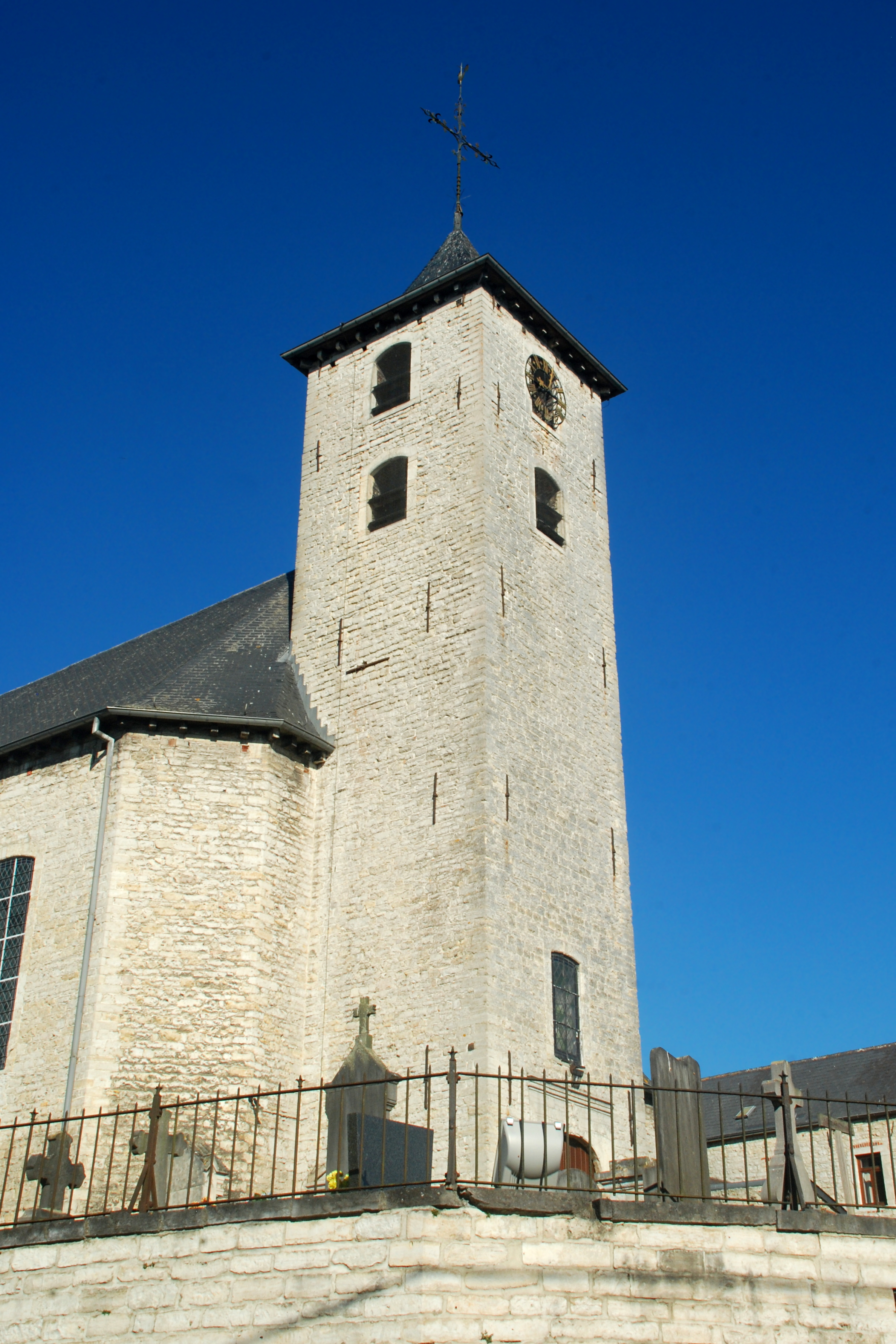 Belgique - Brabant wallon - Jodoigne - Saint-Remy-Geest - Église Saint-Remy